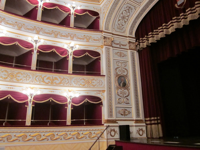 Teatro d'Avola (Sicilia)